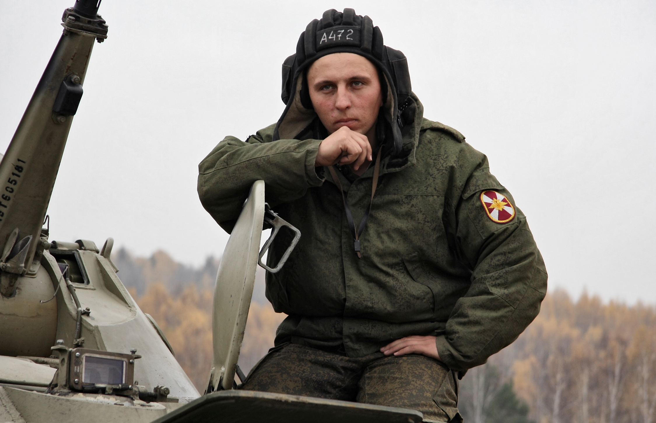 4-й полк оперативного назначения ОДОН ВВ МВД России